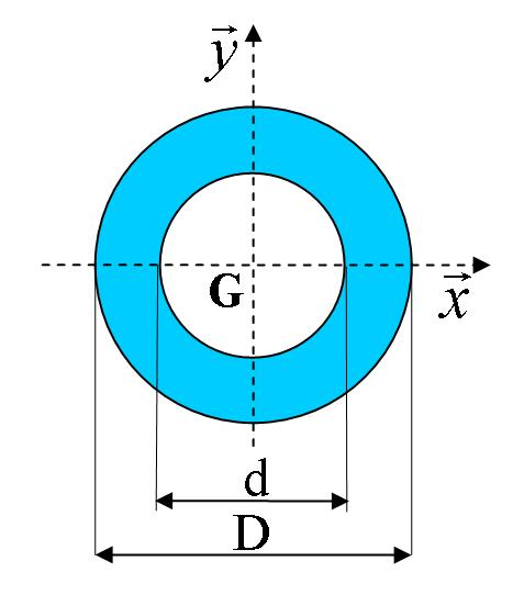 Section tubulaire: schéma pour formules de moment quadratique. Auteur: Xavier Lory.